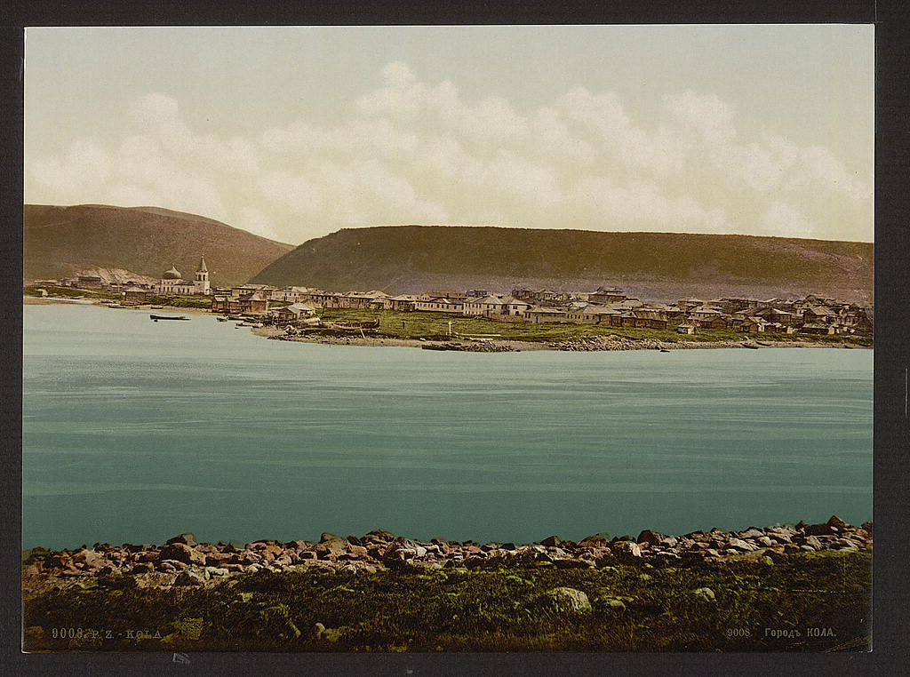 Кола, начало 20 века.